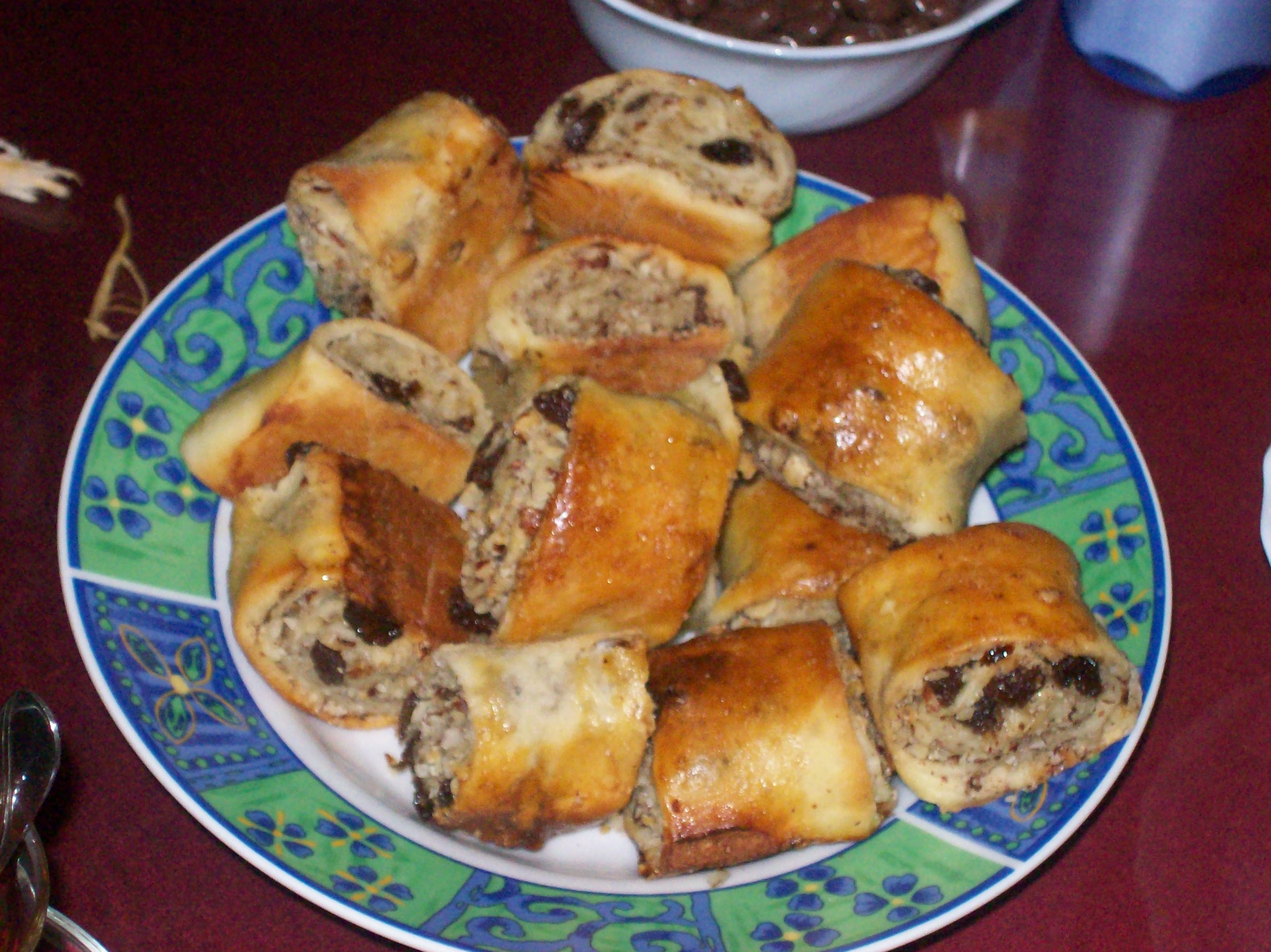 Samsun'da yapılmış fındıklı ve kuru üzümlü nokul.